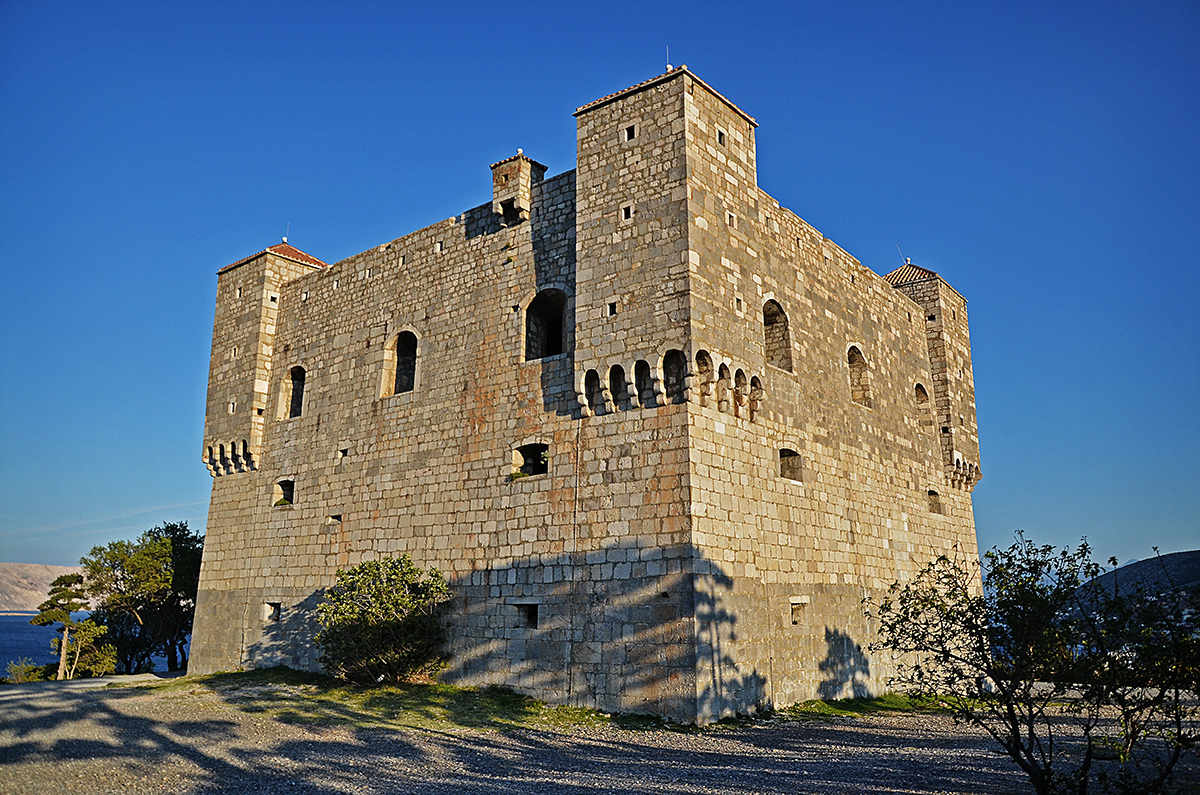 Tvrđava Nehaj, Senj